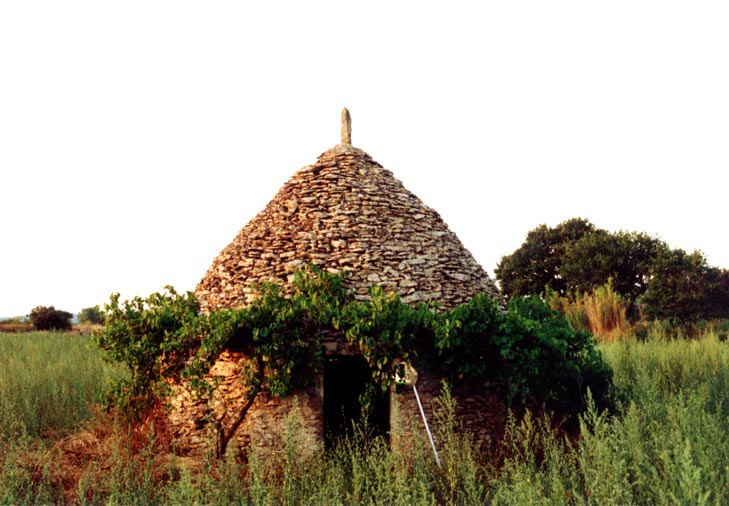 Cabane en pierre sèche (ou capitelle) dans la région d'Uzès (Gard) / Borie auf einem Feld in der Nähe von Uzès, Département Gard